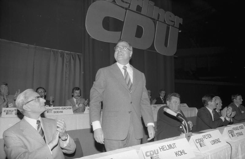 Großkundgebung der CDU in der Deutschlandhalle in Berlin (West)